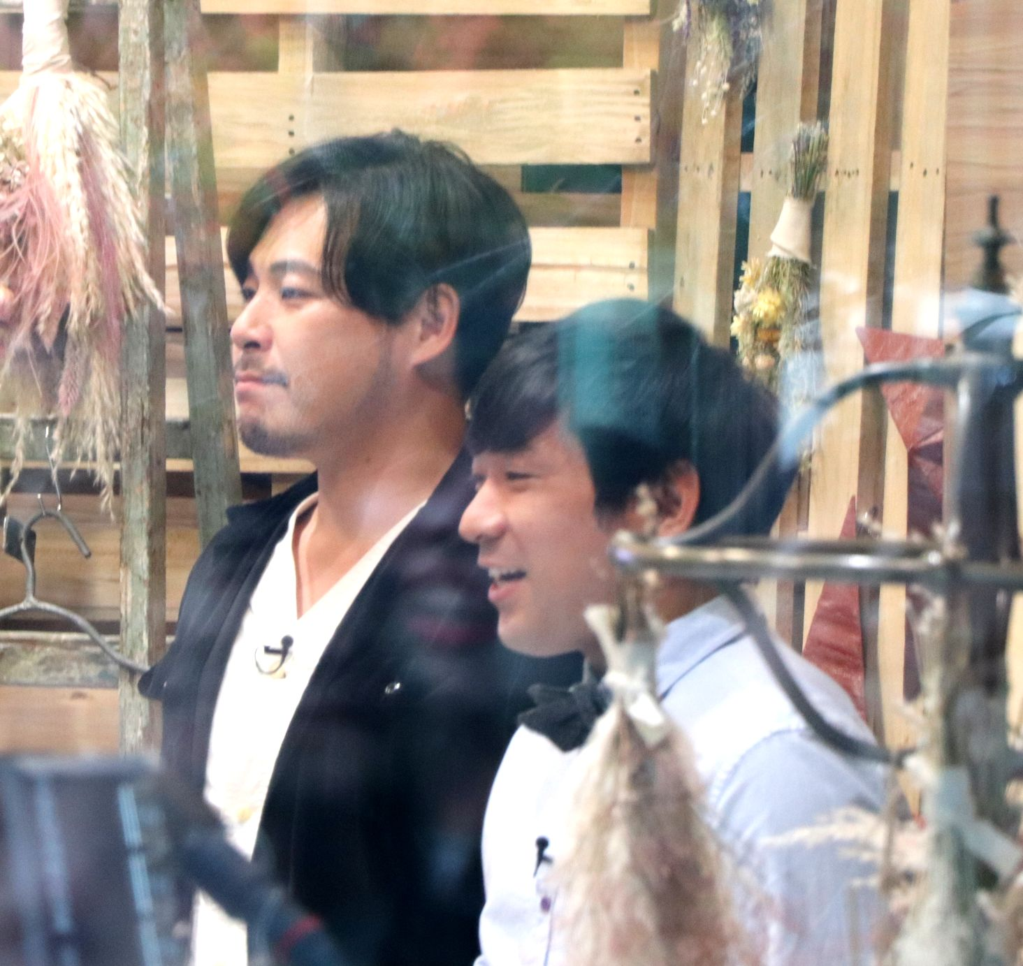 アルコ&ピース（2019年、渋谷）